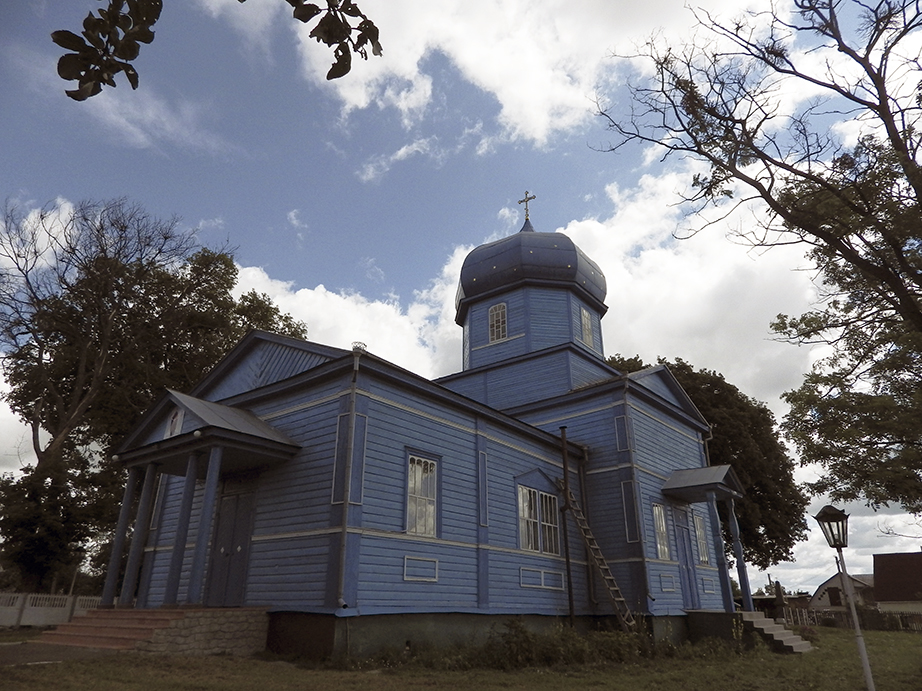 Свято-Покровська церква, с. Бистрик